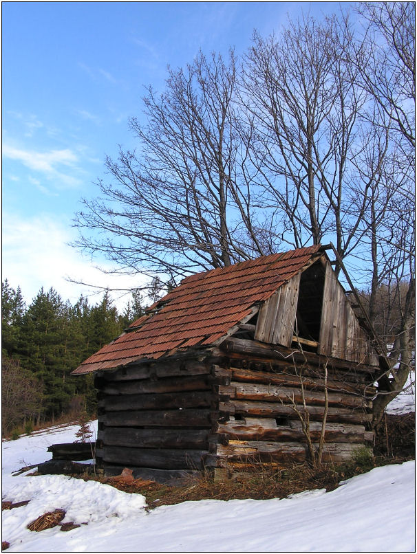 Szałas pasterski na Lachów Groniu-Beskid Żywiecki